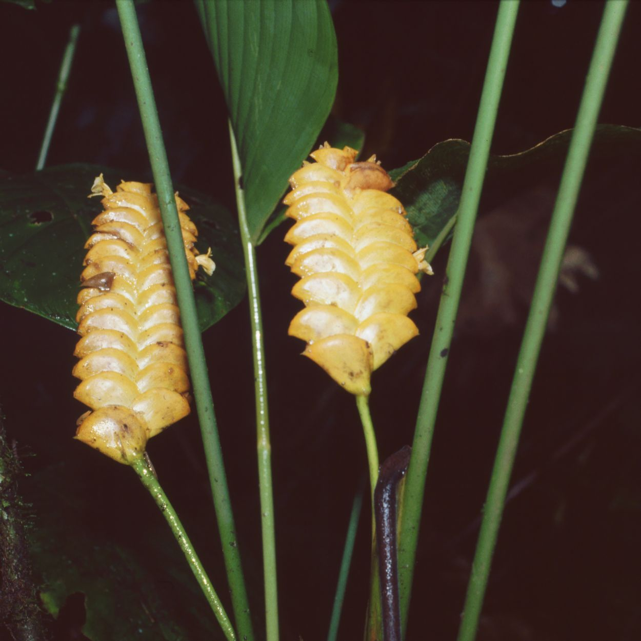 Calathea crotalifera, Marantaceae - Costa Rica: Prov. Puntarenas, PN Piedras Blancas, Bosque Esquinas bei La Gamba, "Catarata Trail"